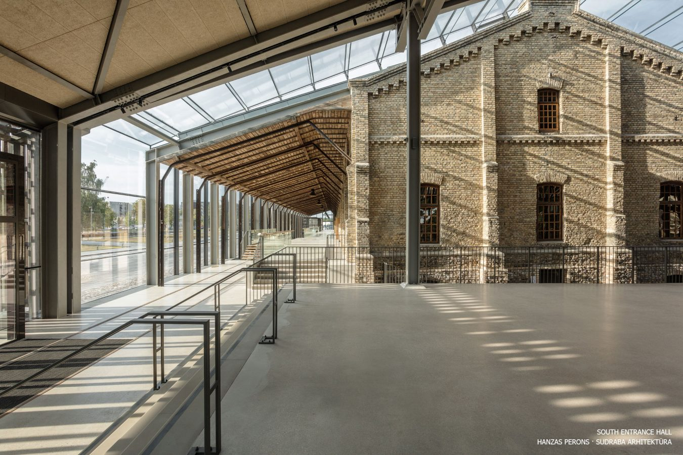 Hanzas Perons, dienvidu ieeja. Autors: Sudraba arhitektūra.